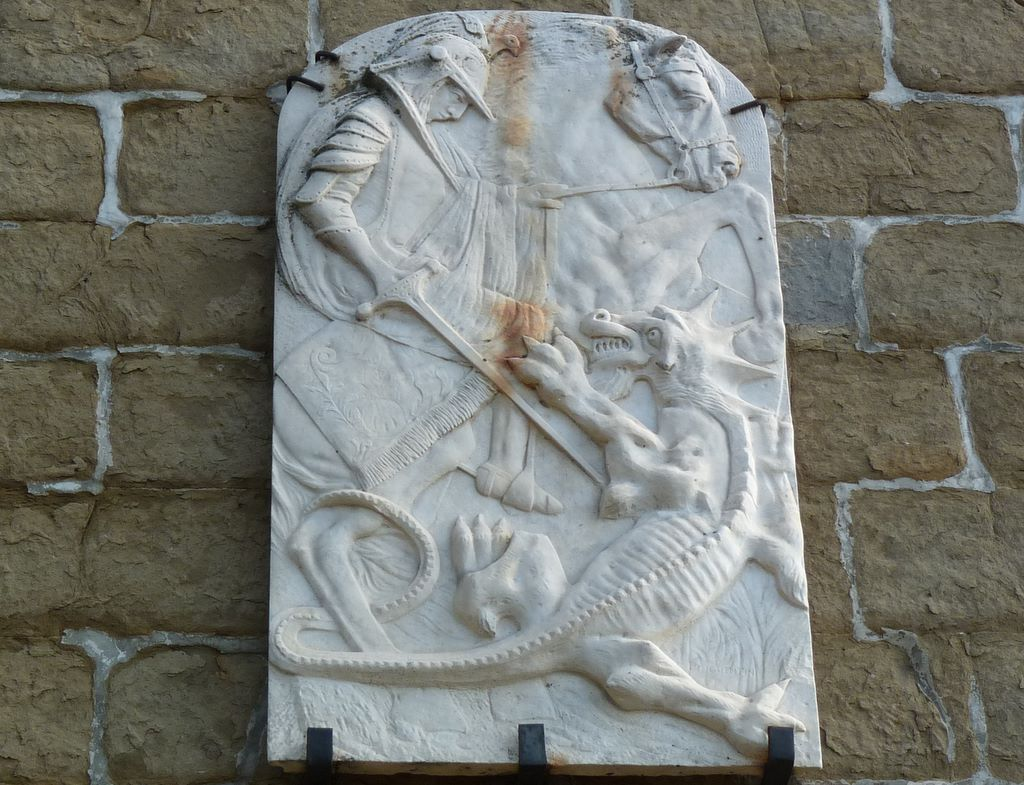 Relief sv. Jurija na zvoniku cerkve sv. Jurija v Pomjanu (Mestna občina Koper; 1866).